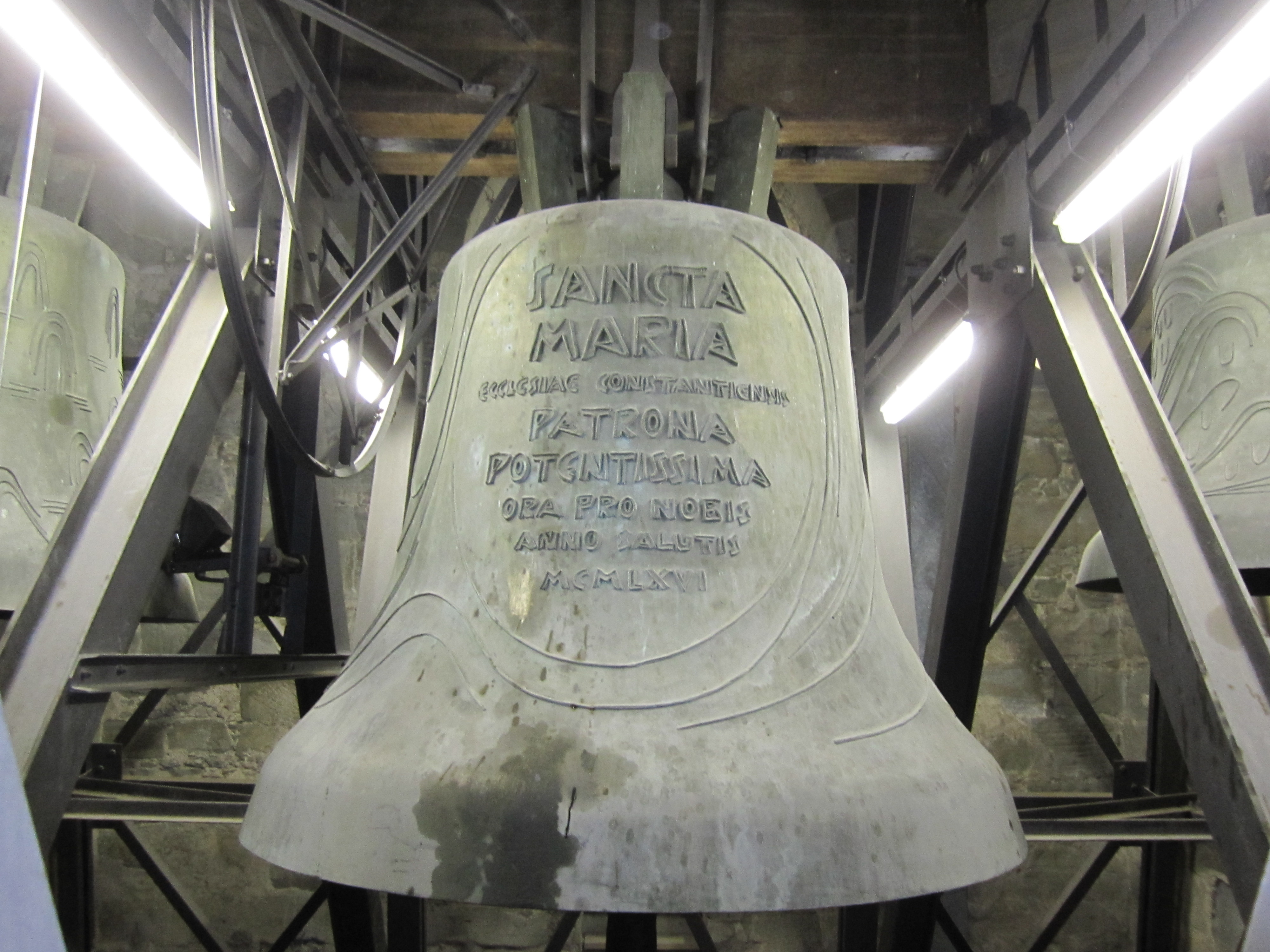 Die große Marienglocke des Konstanzer Münsters